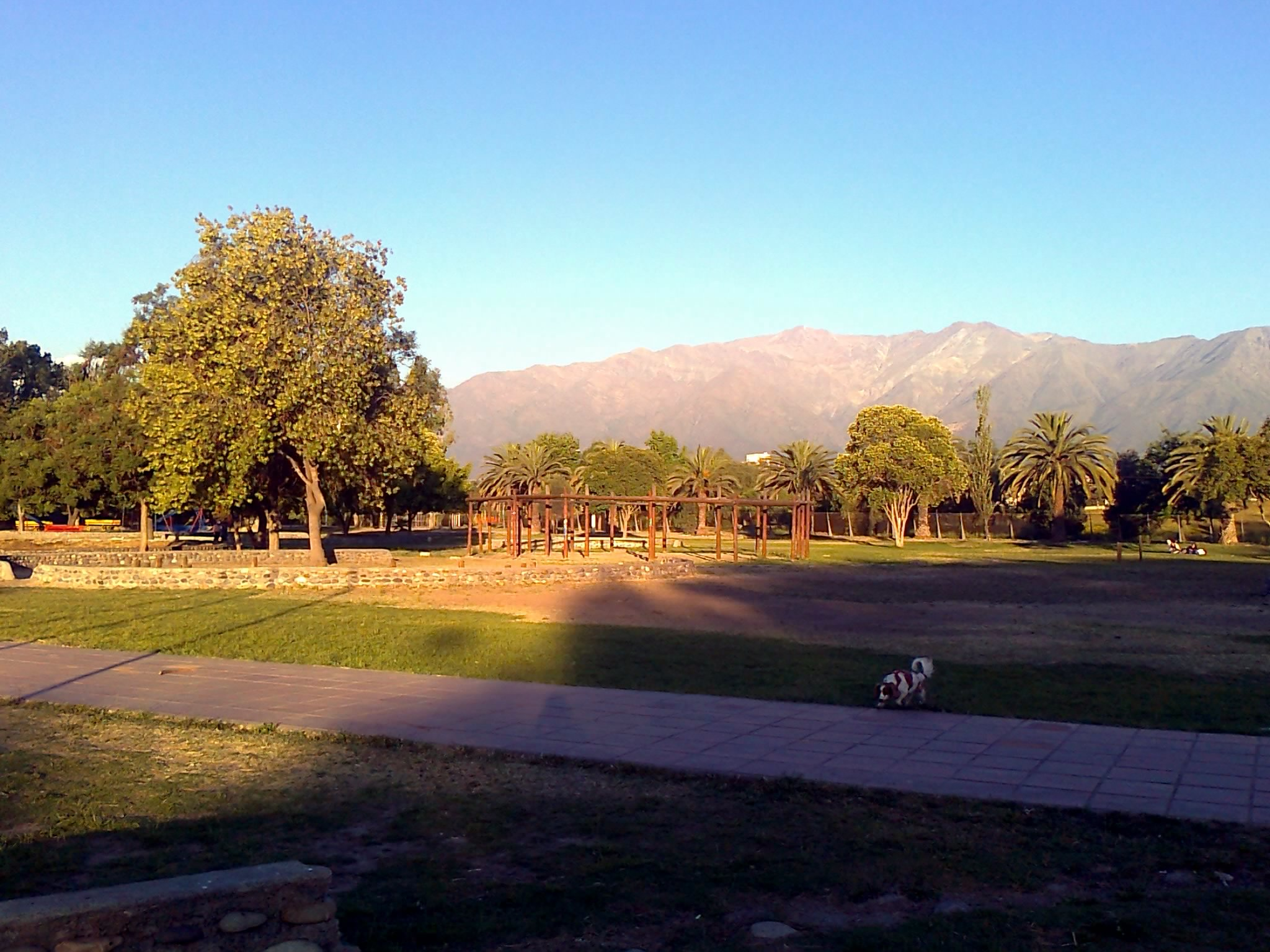 Vista al sector norponiente del Parque República de Brasil, en Santiago de Chile.